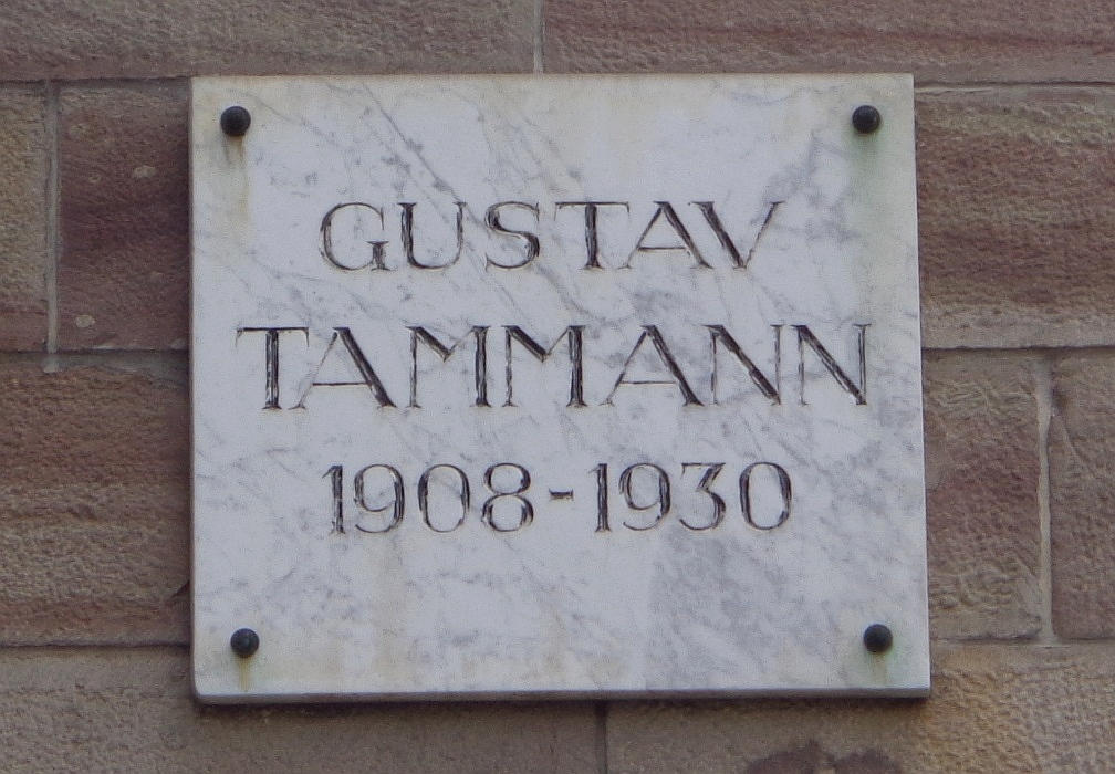 Göttinger Gedenktafel für Gustav Tammann, Chemiker (Bürgerstraße 50)